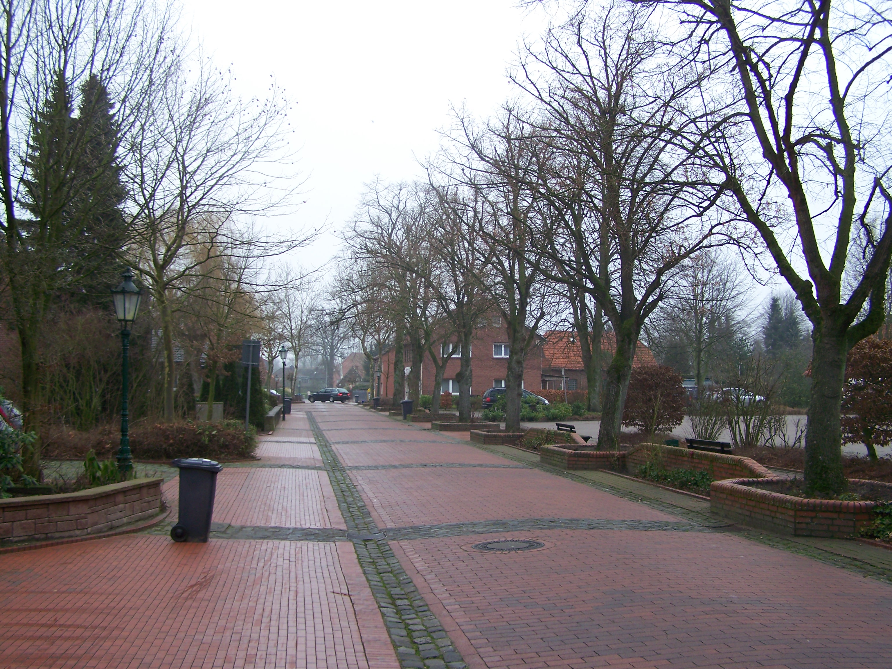 Dorfstraße Schapen